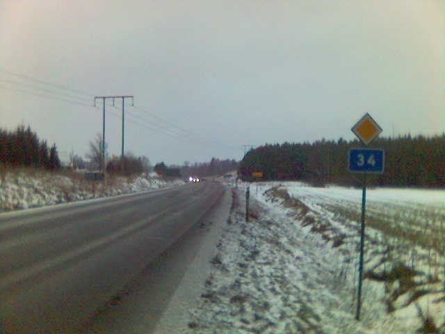 Riksväg 34 lämnar Linköping